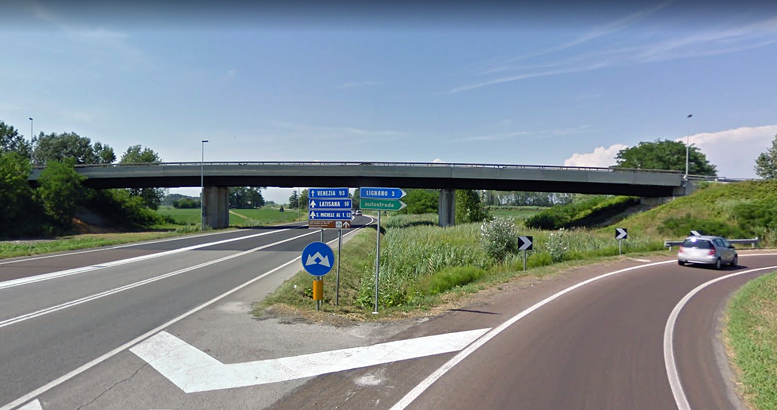 SR74 San Michele al Tagliamento-Bibione